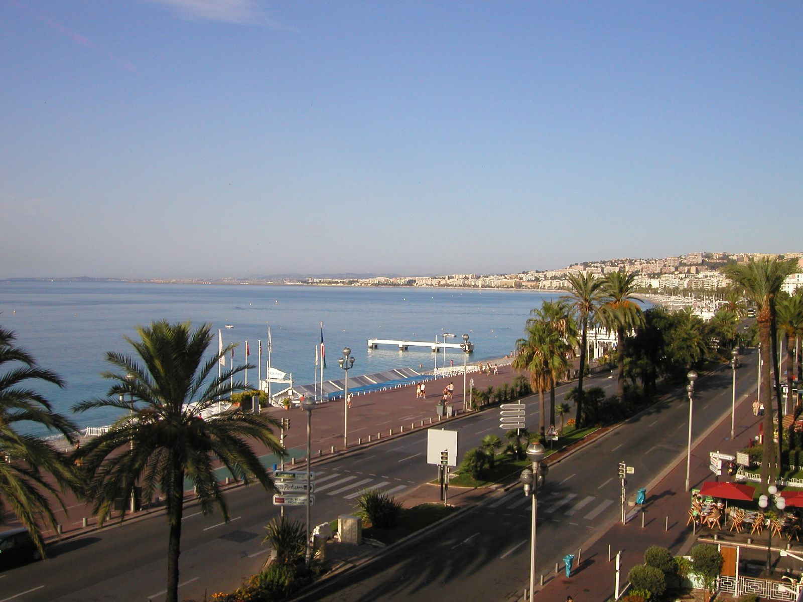 Vue d'une partie de la promenade des Anglais, à Nice (France), depuis l'un des bâtiments la bordant.